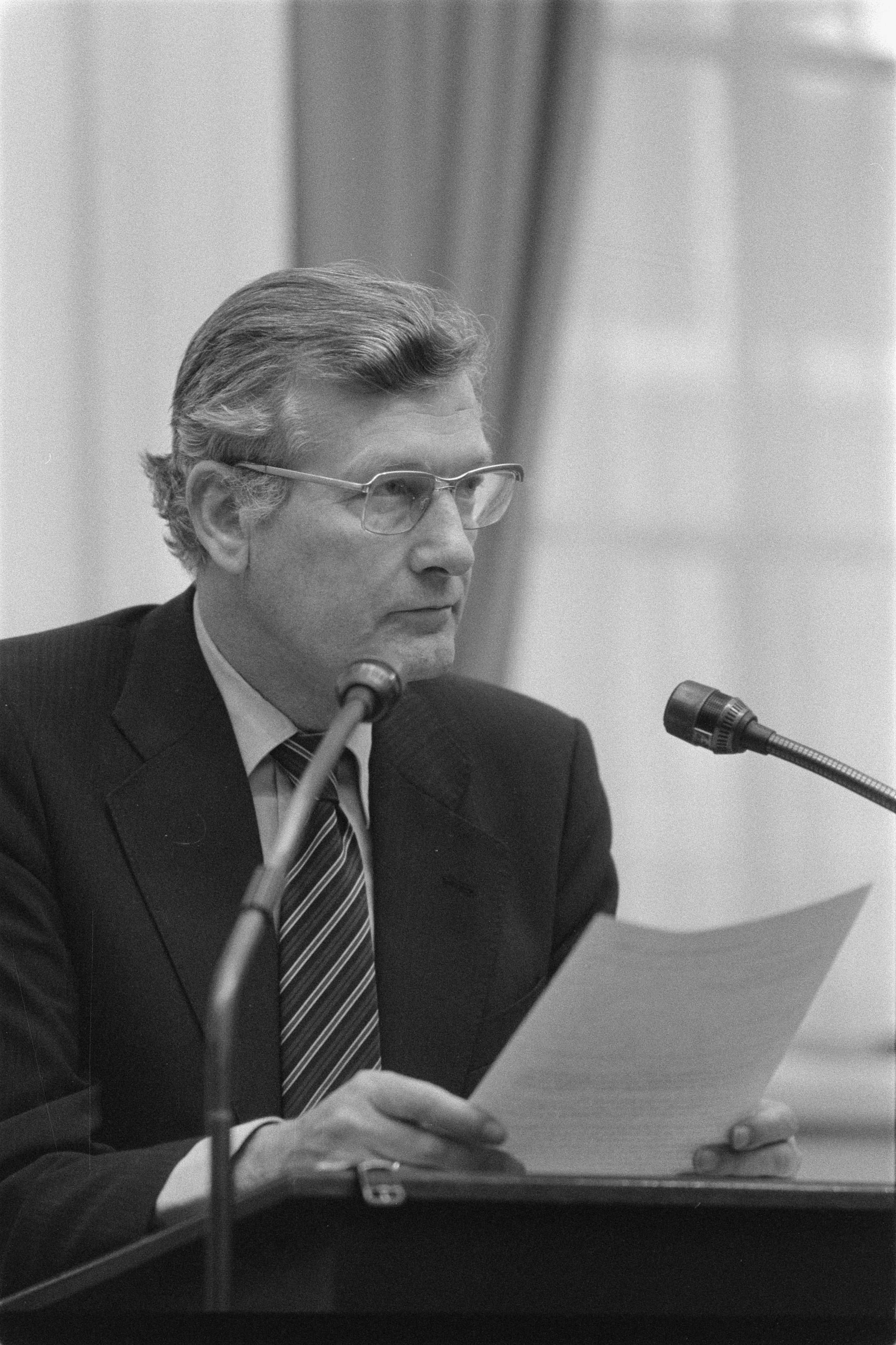 Collectie / Archief : Fotocollectie Anefo Reportage / Serie : Tweede Kamer: afdeling politie Beschrijving : Minister De Koning (Sociale Zaken) aan het woord Datum : 25 november 1981 Locatie : Den Haag, Zuid-Holland Trefwoorden : ministers, portretten Persoonsnaam : Koning, Jan de Fotograaf : Croes, Rob C. / Anefo Auteursrechthebbende : Nationaal Archief Materiaalsoort : Negatief (zwart/wit) Nummer archiefinventaris : bekijk toegang 2.24.01.05 Bestanddeelnummer : 931-8259